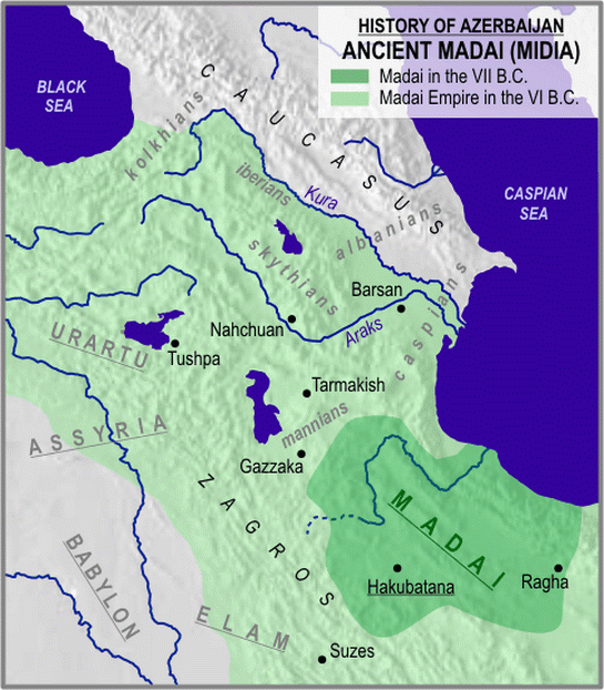 território original dos medos (mostrado em verde escuro)